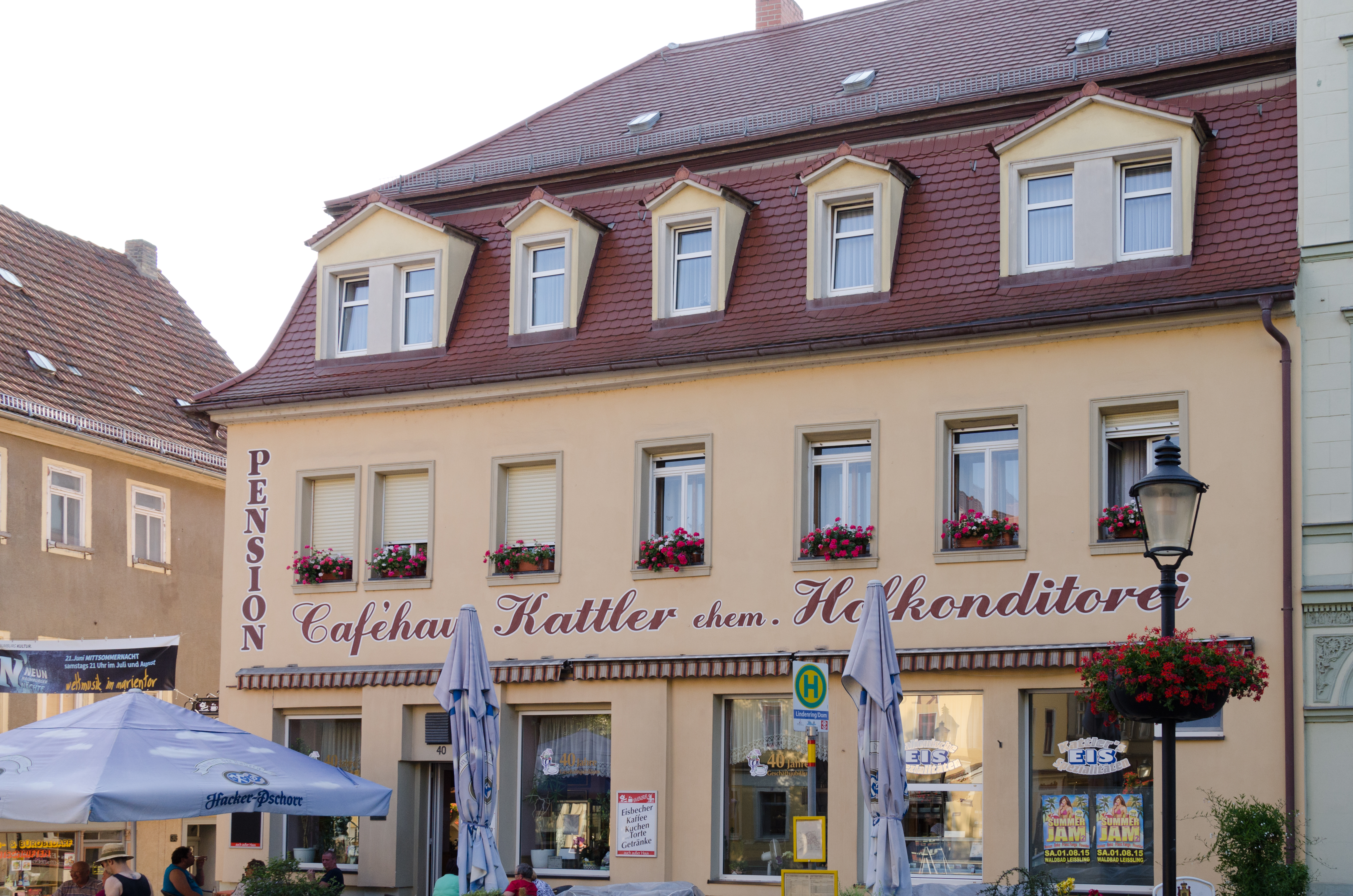 Naumburg, Lindenring 40